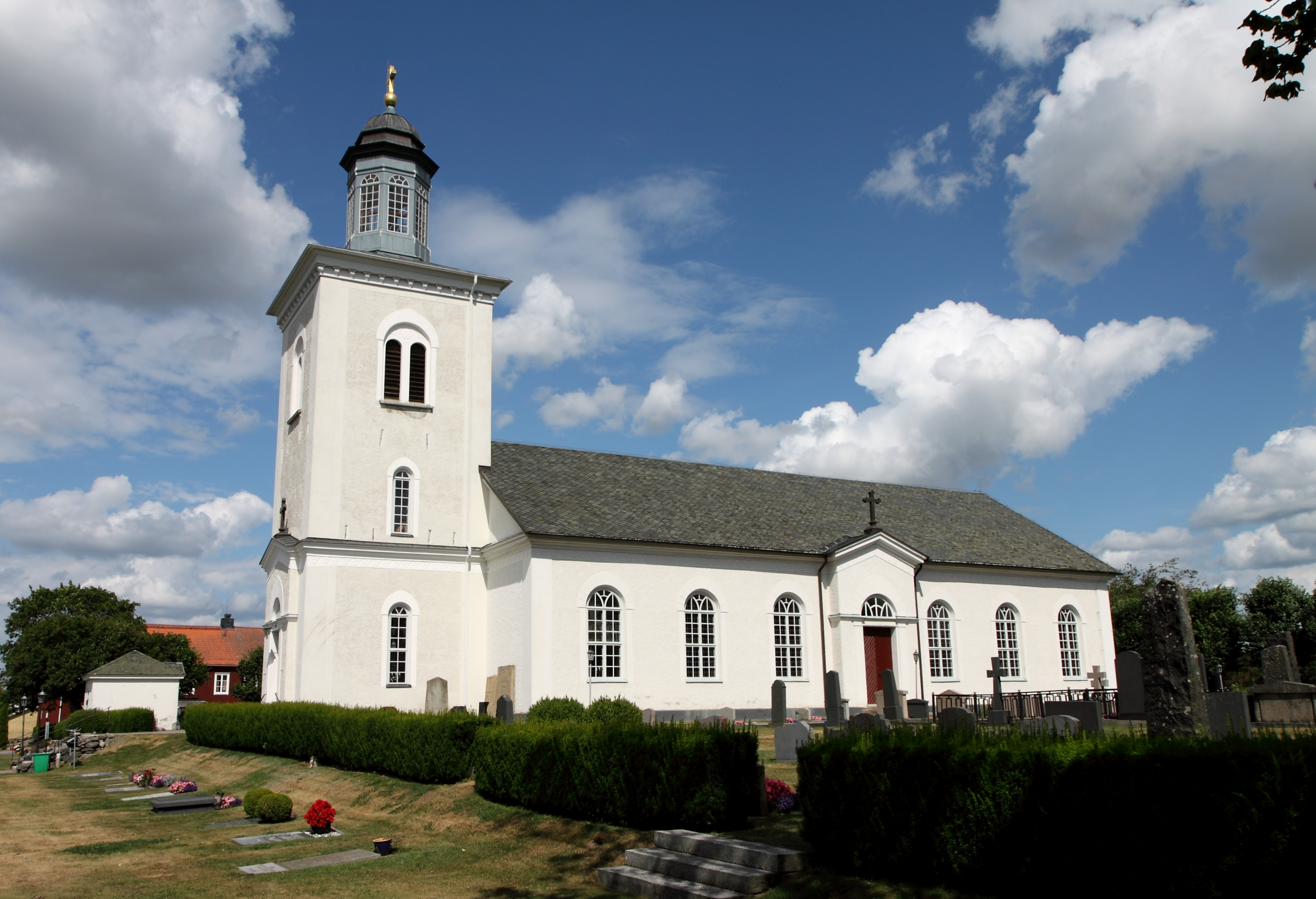 Värsås kyrka.